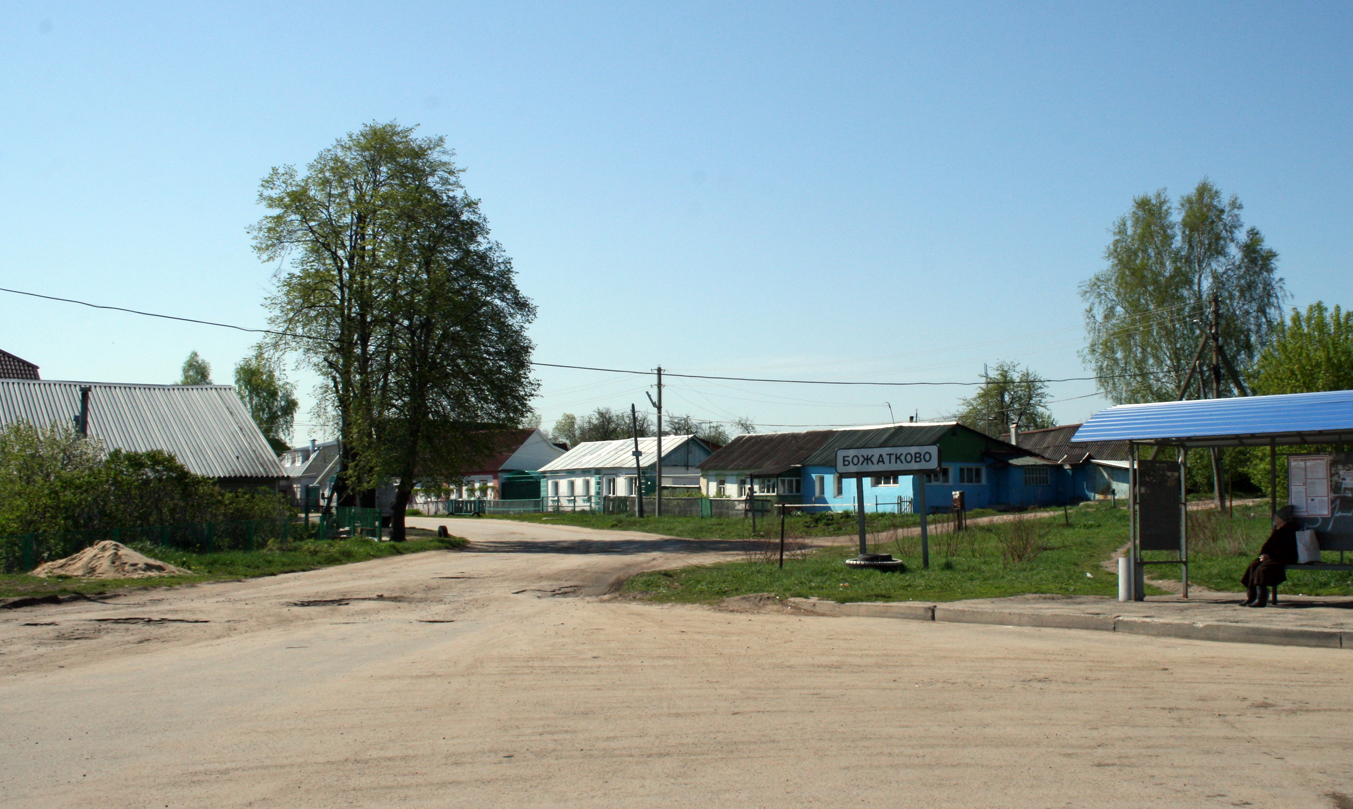 Посёлок Божатково г. Рязани. 7 мая 2016 г. Фото: А. Миронов